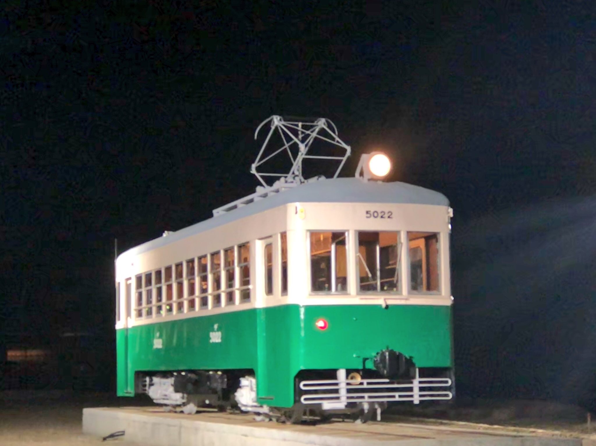 新吉久電停横に記念テーマパークとしてオープンした「TEKリトルパーク」に展示されているデ5022